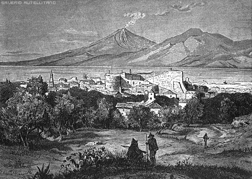 old incision - Antica incisione raffigurante Reggio Calabria ed il suo castello con il vulcano Etna sullo sfondo.